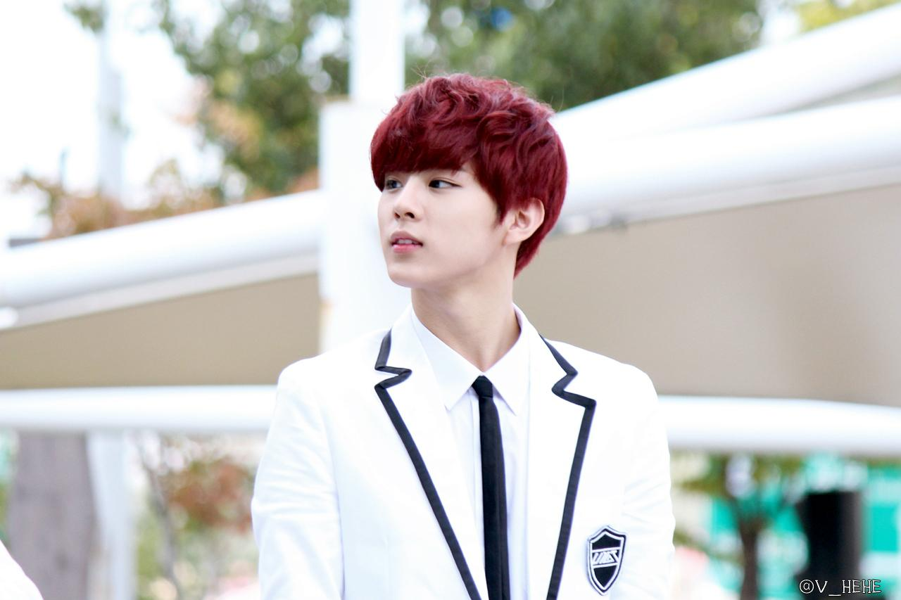 업텐션 우신ː150919 음악중심 허그회